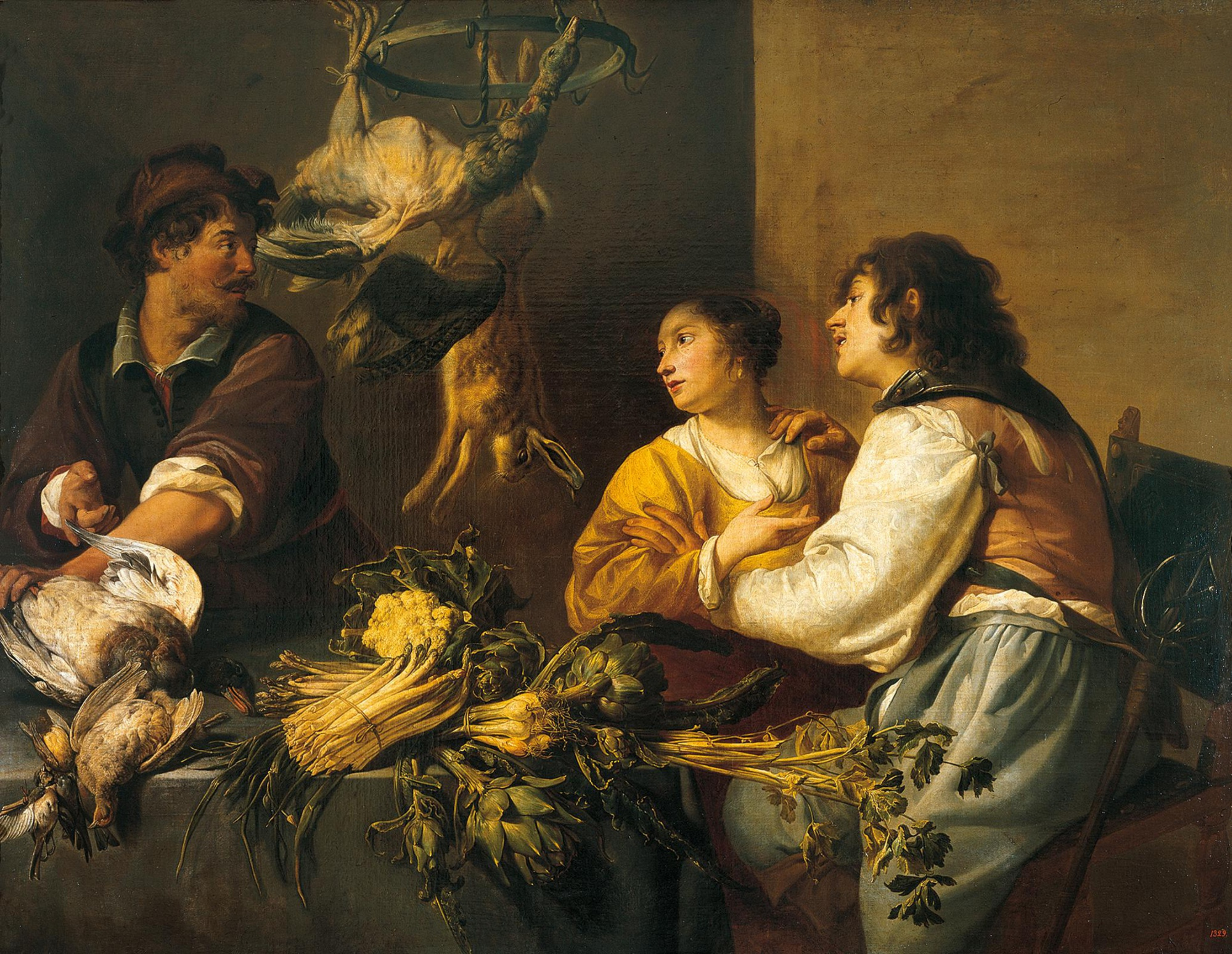 Kitchentitle QS:P1476,en:"Kitchen" label QS:Len,"Kitchen"